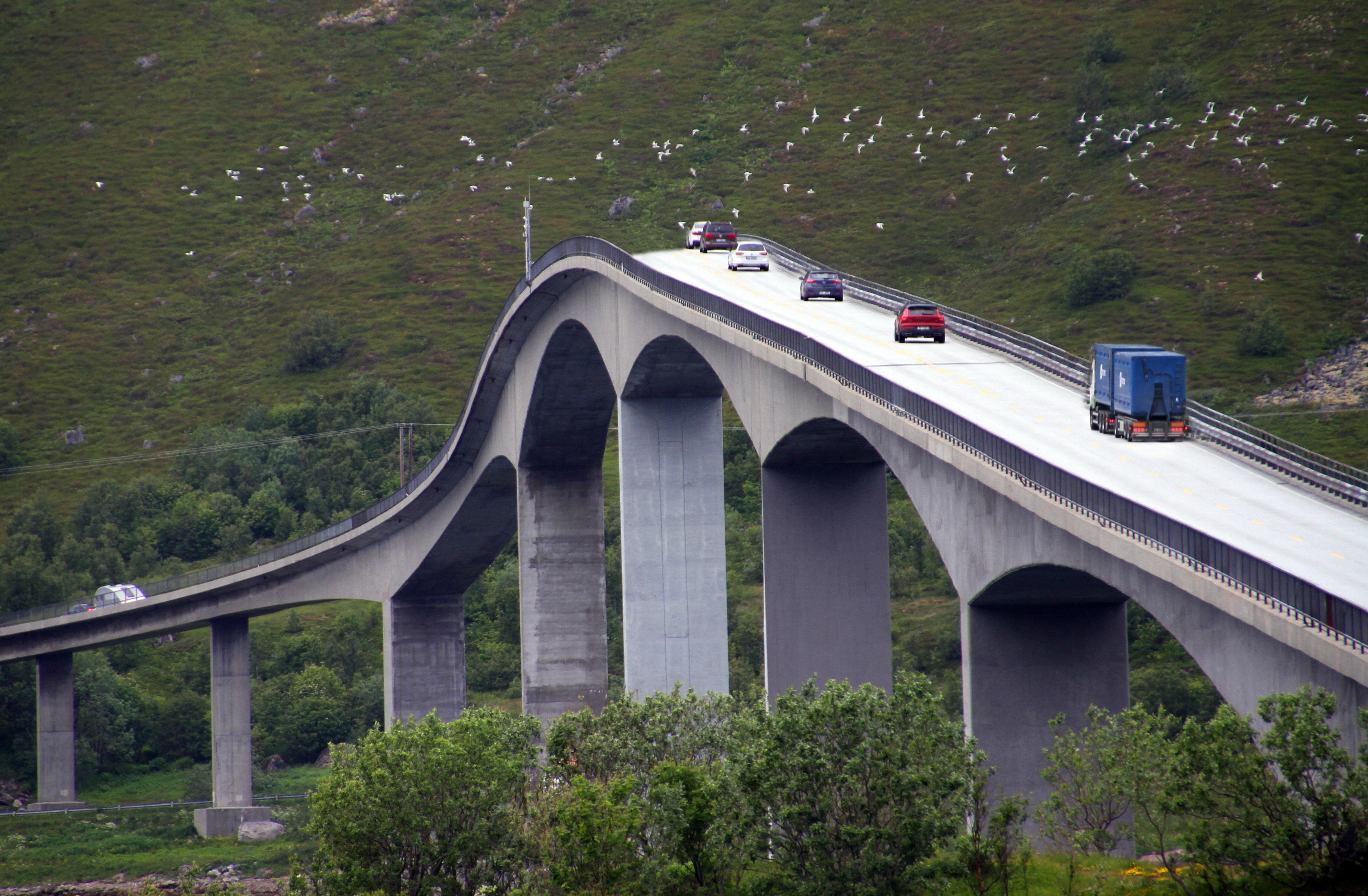 Gimsøystraumen-Bruecke zwischen Austvågøy und Gimsøy (Lofoten, Norwegen)